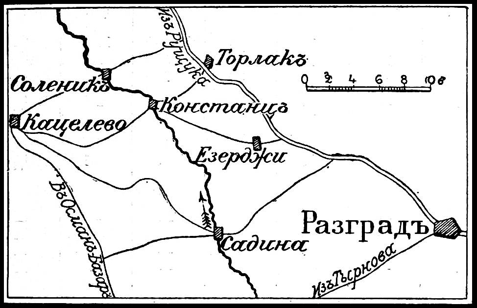 Театр военных действий сражения при Езерче. Это изображение было использовано для иллюстрирования статьи «Езерджи (Езерче, Езержи, Есерджи)» опубликованной в девятом томе «Военной энциклопедии», который был издан книгоиздательским товариществом И. Д. Сытина в 1912 году в столице Российской империи городе Санкт-Петербурге.